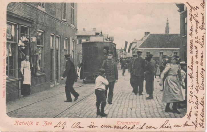 Katwijk, Tramstraat, begin 20e eeuw. Fotograaf J. Braakman. Stoomtram. Een van de zeldzaamste ansichten van Katwijk e.o. Dit is een betere versie van een eerdere foto van deze kaart, hoewel, wel een ander exemplaar. 1900-1902 (schatting) J. Braakman photographer en publisher